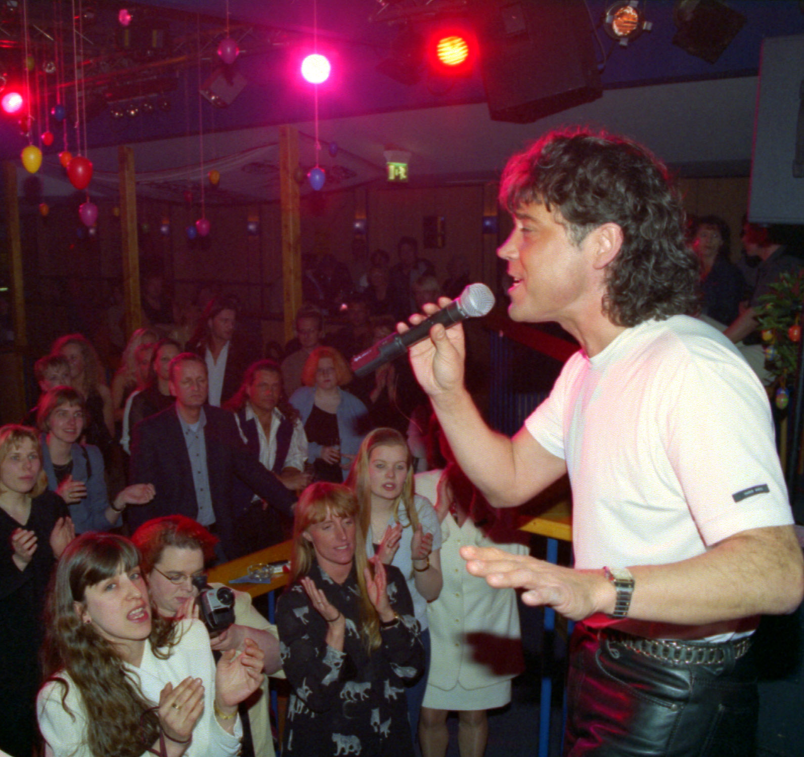 Foto von Dennie Christian im Oldenburg, Deutschland. Fotograph: Stefan Ulrichs Lisenz: GFDL The email with permission is in the "Kluis". You can ask Dutch sysops to confirm the permission.